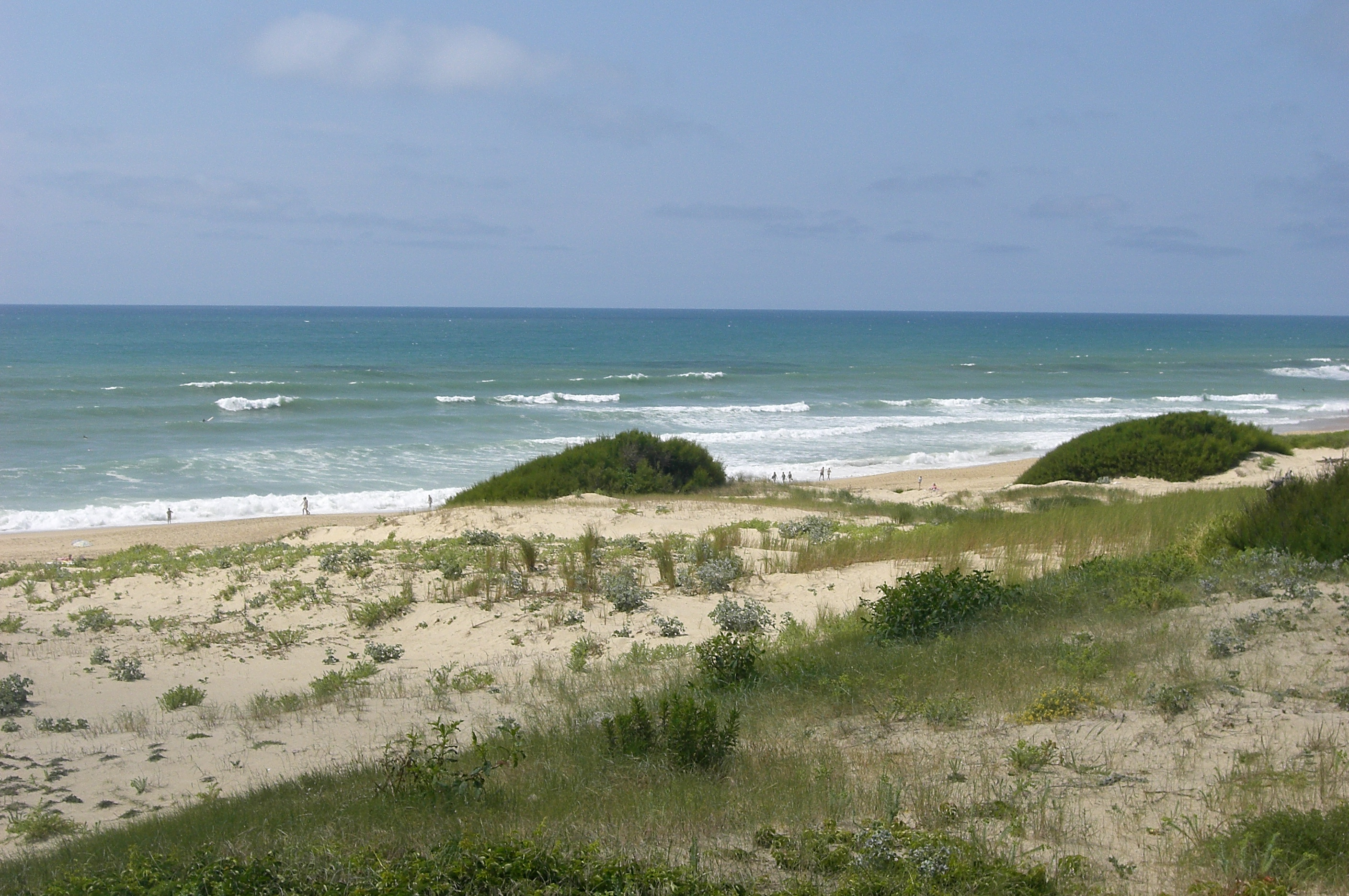 Dune de sable et plage à Seignosse-Océan